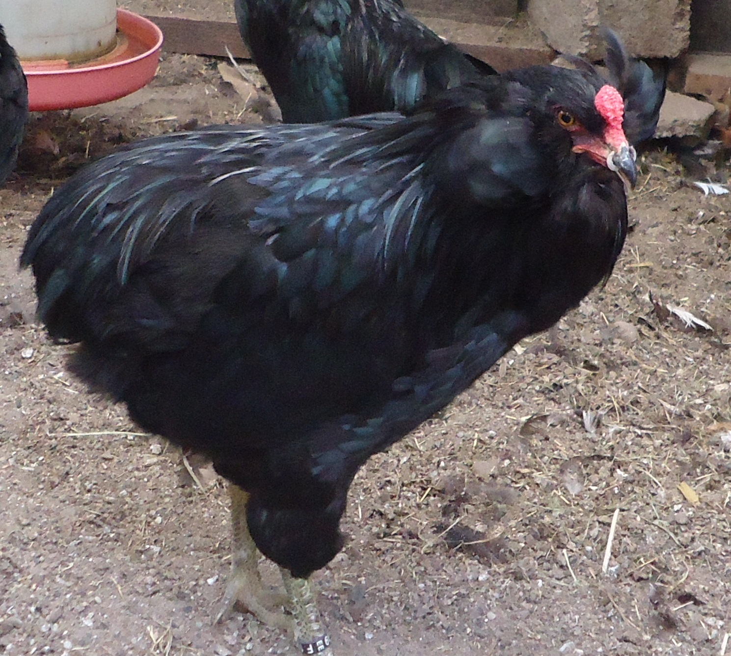 Coq araucana